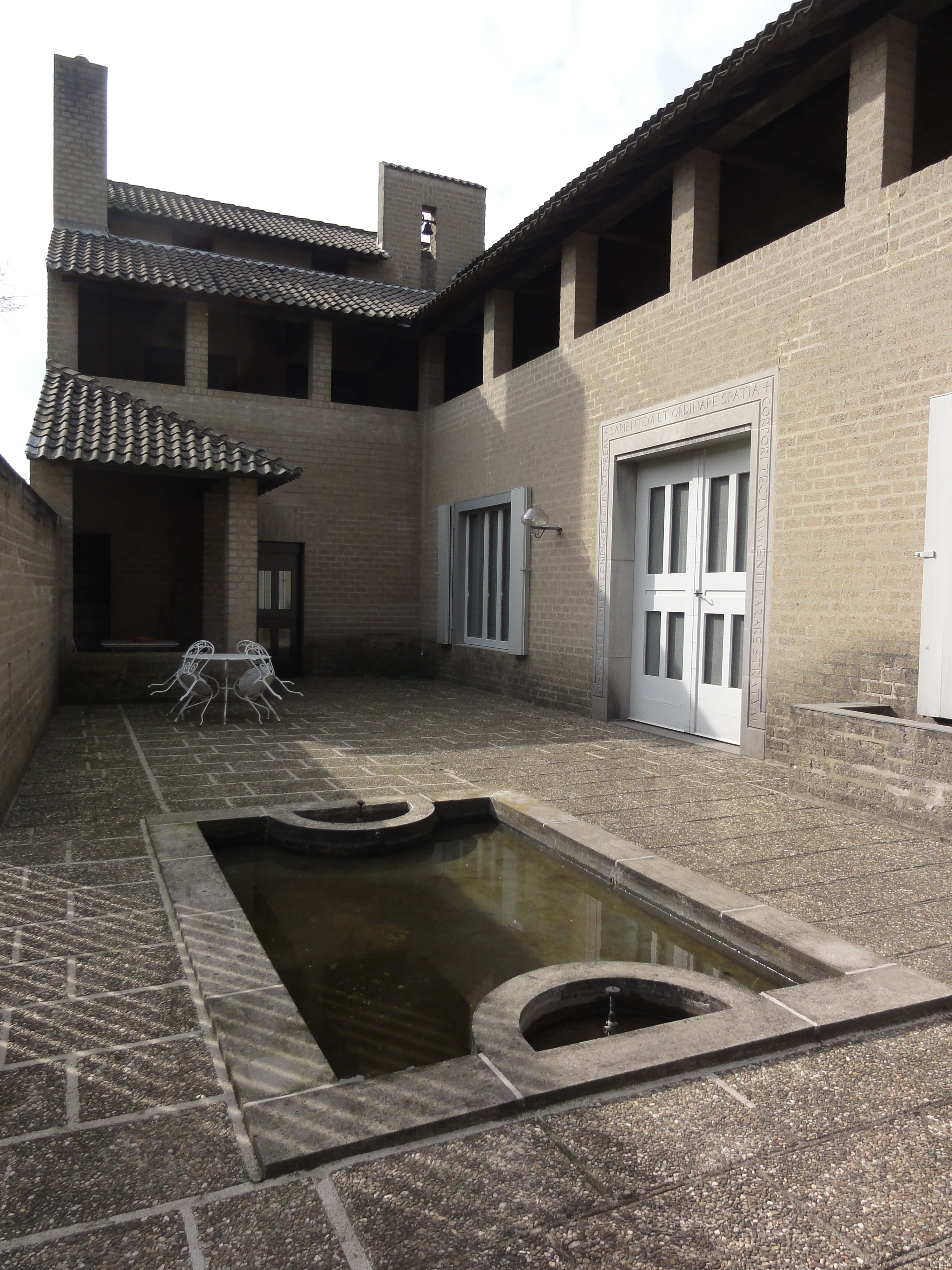 Schaijk (Landerd, N-Br) Huis van Jan de Jong, terras met woonvleugel. Architect Jan de Jong